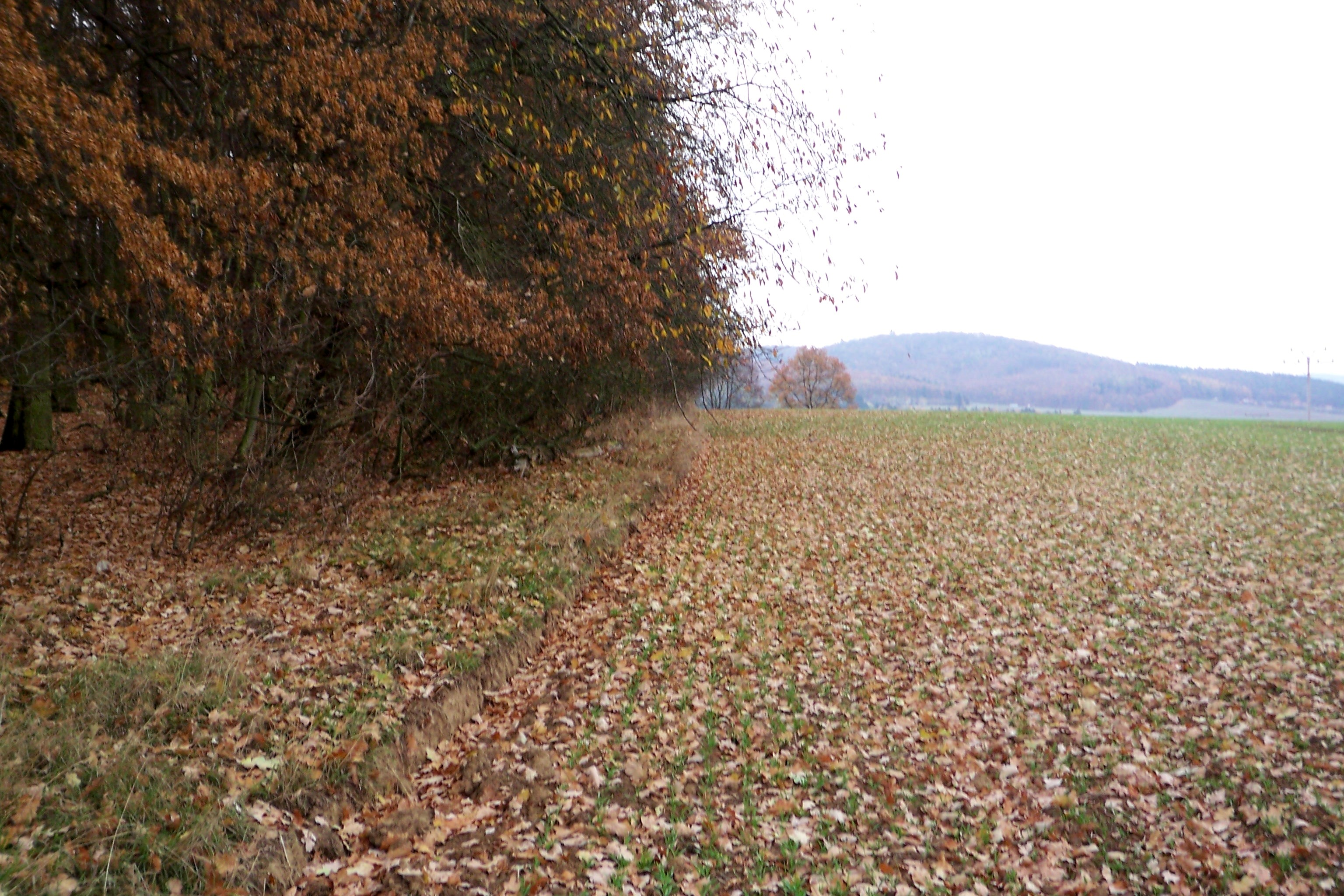 Rozhraní mezi přírodní rezervací Zlín a hospodářsky obdělávanou krajinou.